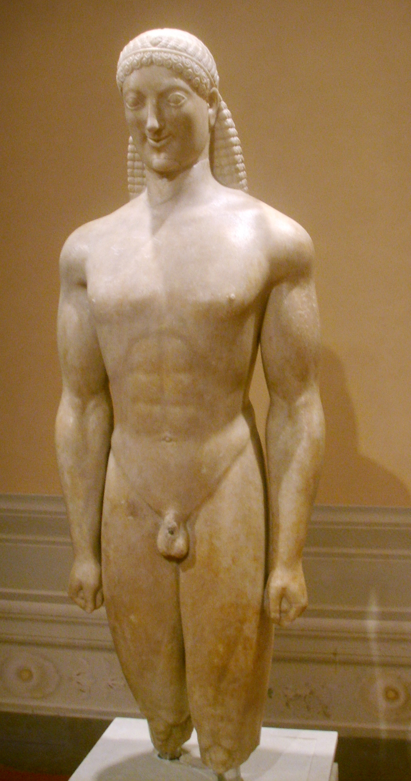 Kouros_di_Milani_530_a.c. Museo_archeologico_di_Firenze museum in Florence